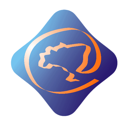 Português